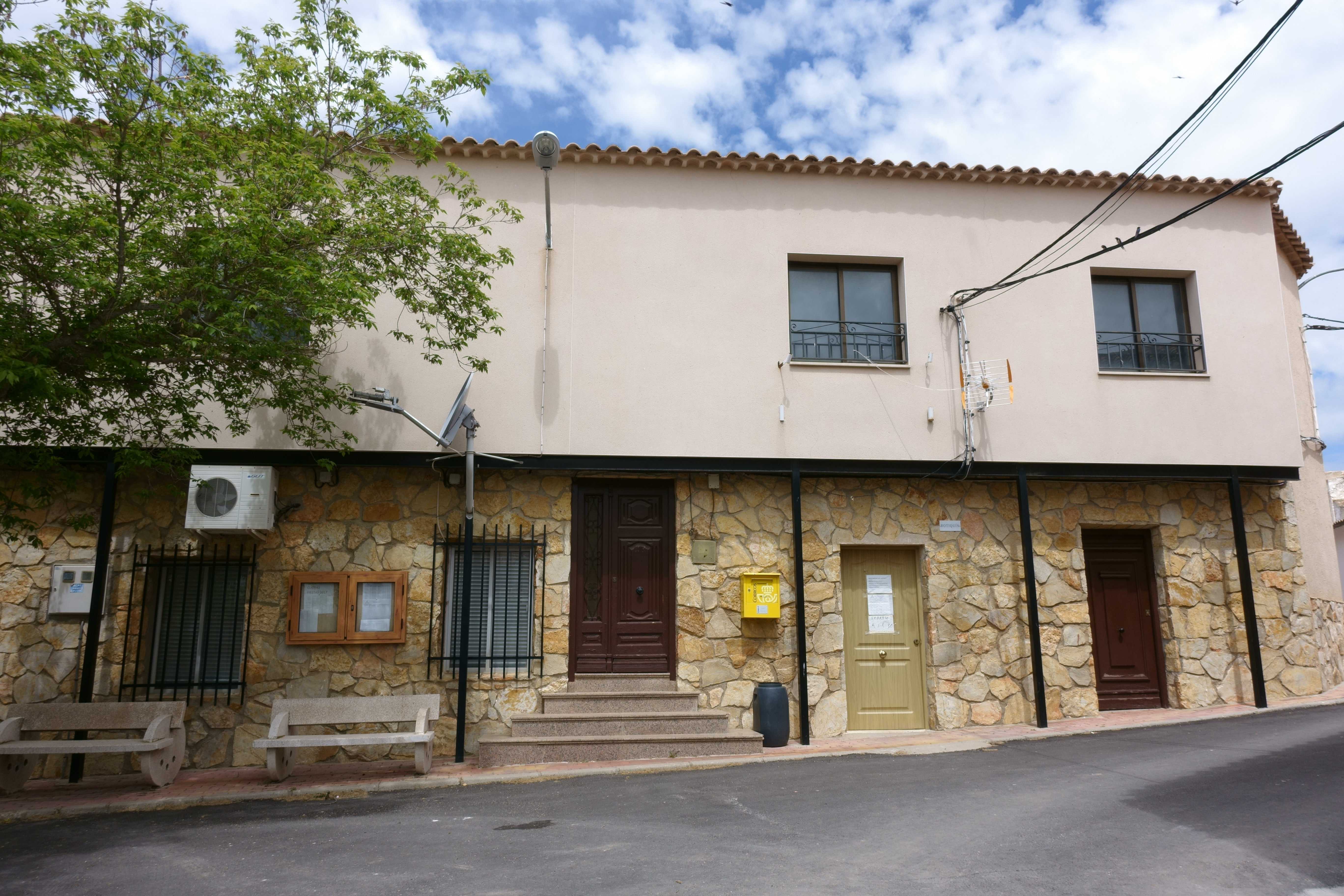 Casa consistorial de Carrascosa de Haro (Cuenca, España).